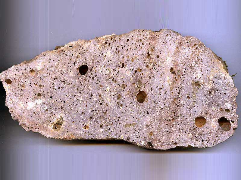 Fragment de brèche d'impactite du cratère d'impact de Rochechouart (France). Brèche à forte fusion : type Babaudus Baubadus est un lieu-dit situé au centre de l'impact. Cet échantillon montre une matrice vitreuse très abondante emprisonnant des petits fragments de roche (essentiellement du quartz). Les bulles ont été générées par des températures de plusieurs milliers de degrés.